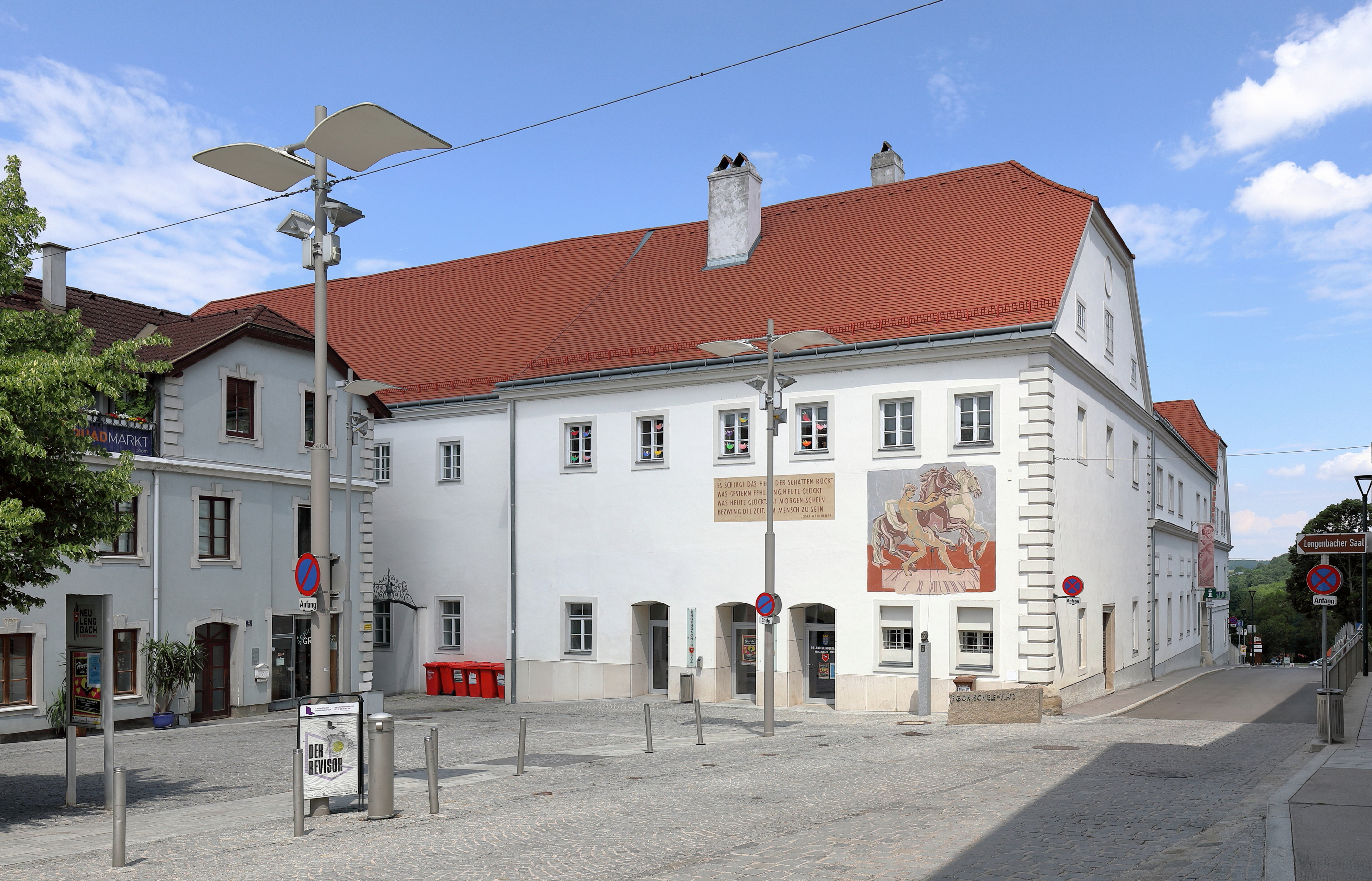 Nordostansicht des Bezirksgerichtsgebäude in der niederösterreichischen Stadtgemeinde Neulengbach. Ein mächtiger Spätrenaissancebau, der um 1620 erbaut wurde. Ursprünglich war der Bau eine dreiflügelige Anlage, die im 19. Jahrhundert durch einen Zubau zu einer Vierflügelanlage erweitert wurde und 1951 erfolgte eine Aufstockung des Straßentraktes.